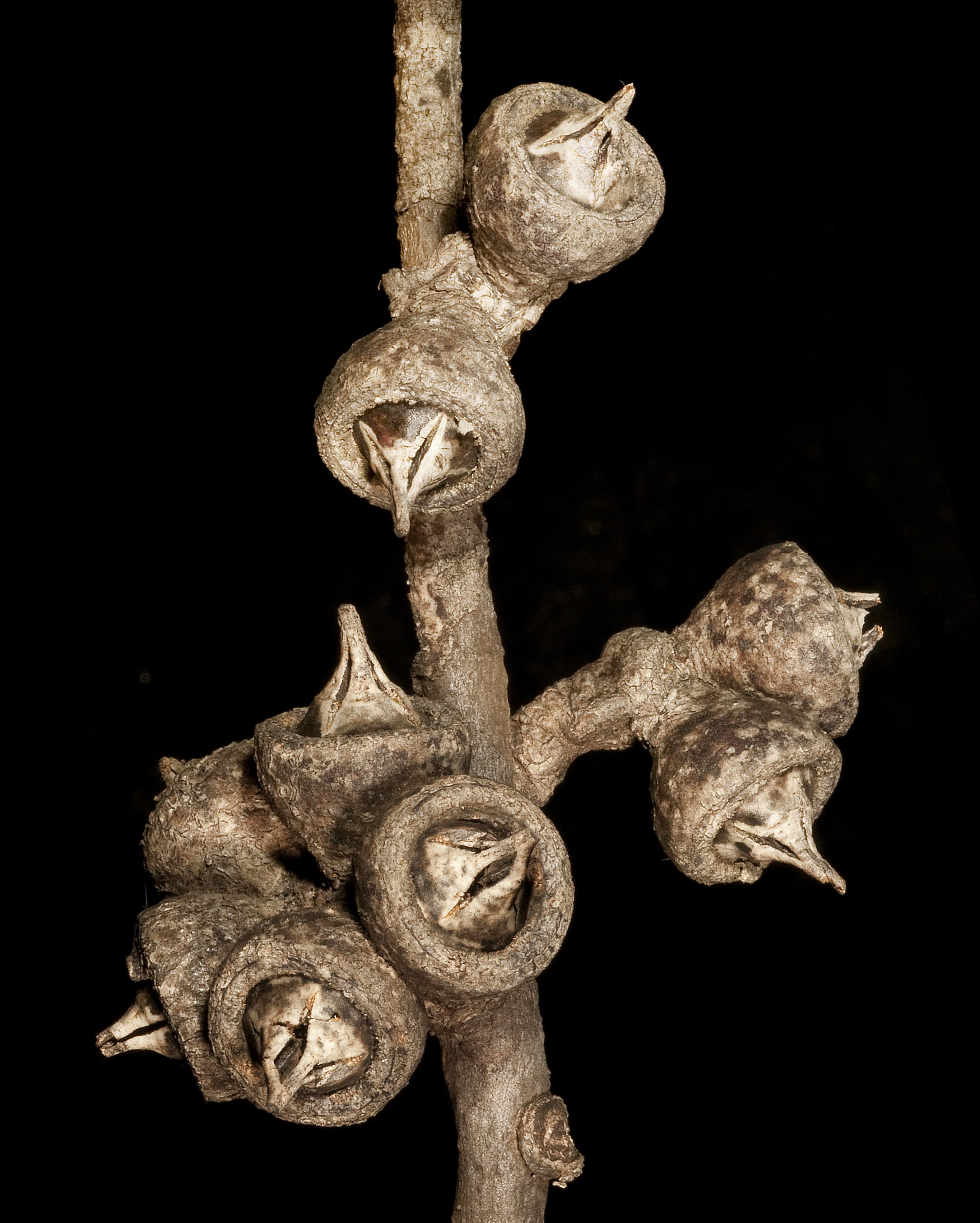 KRT4548